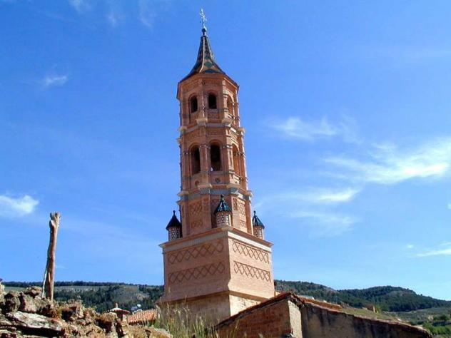 Torre mudejar en la localidad de Monterde (Zaragoza)